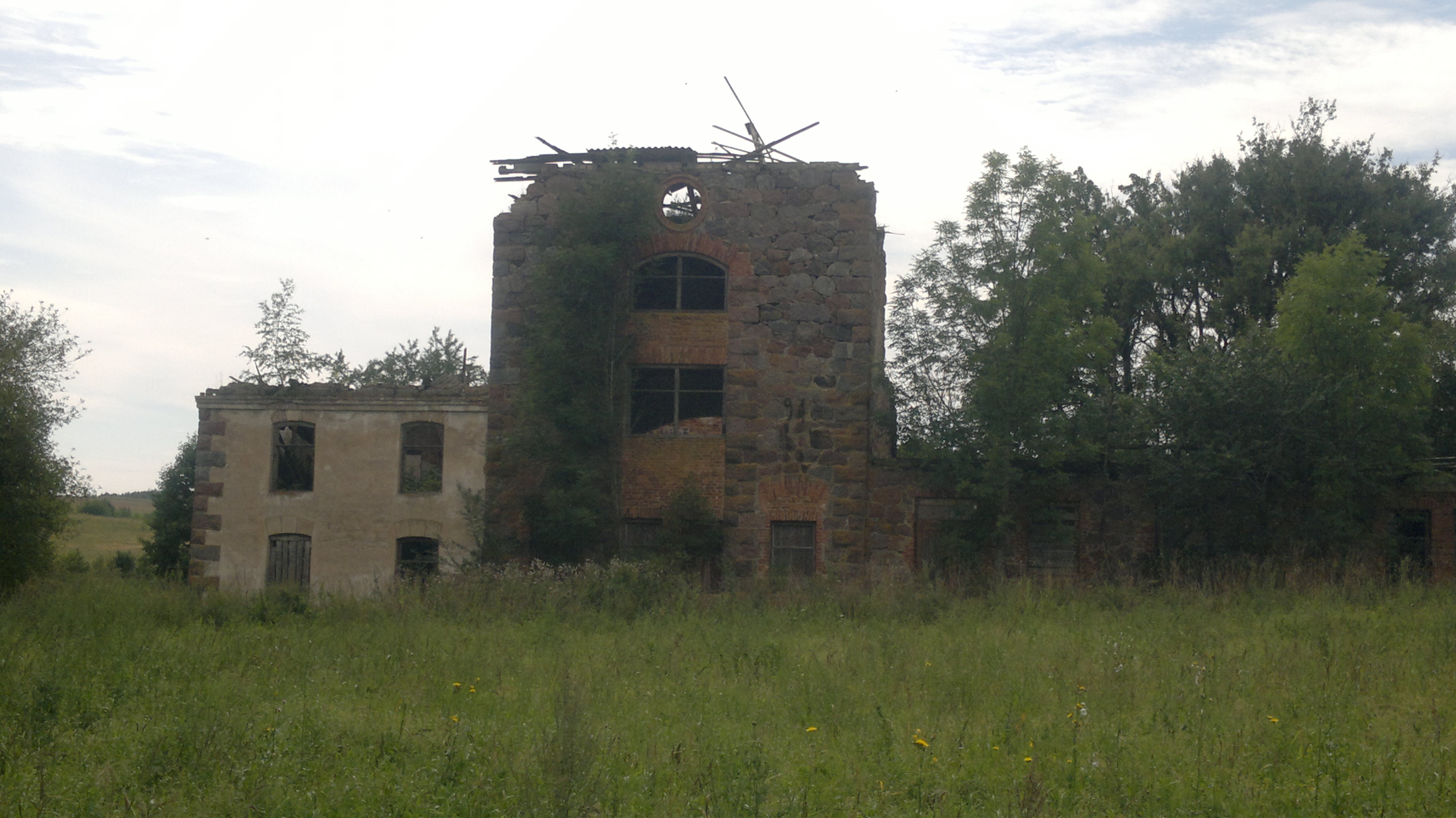 Остатки главного здания усадьбы